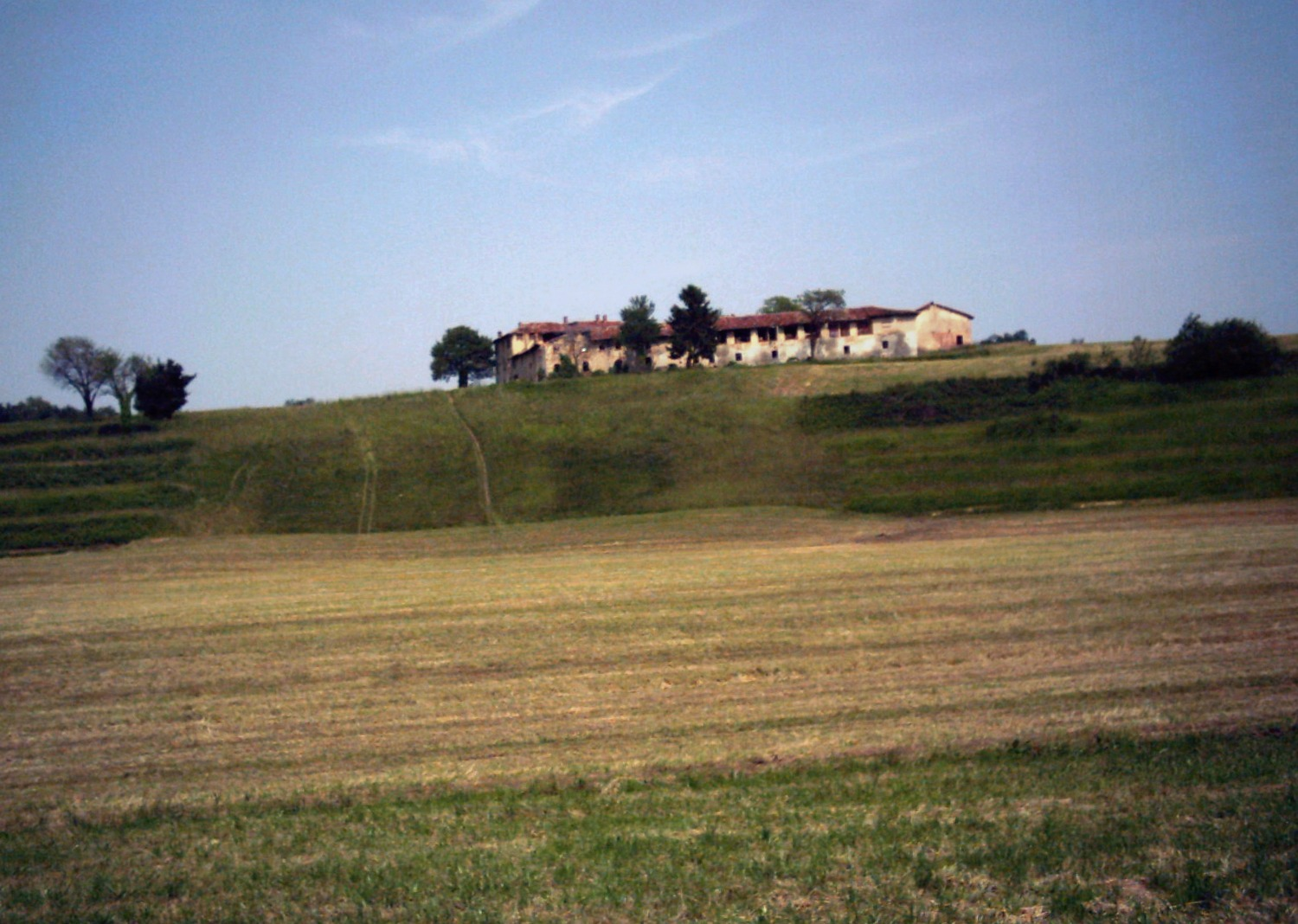 Cascina di Santa Naga, a Fecchio, frazione del comune di Cantù, in provincia di Como, maggio 2004